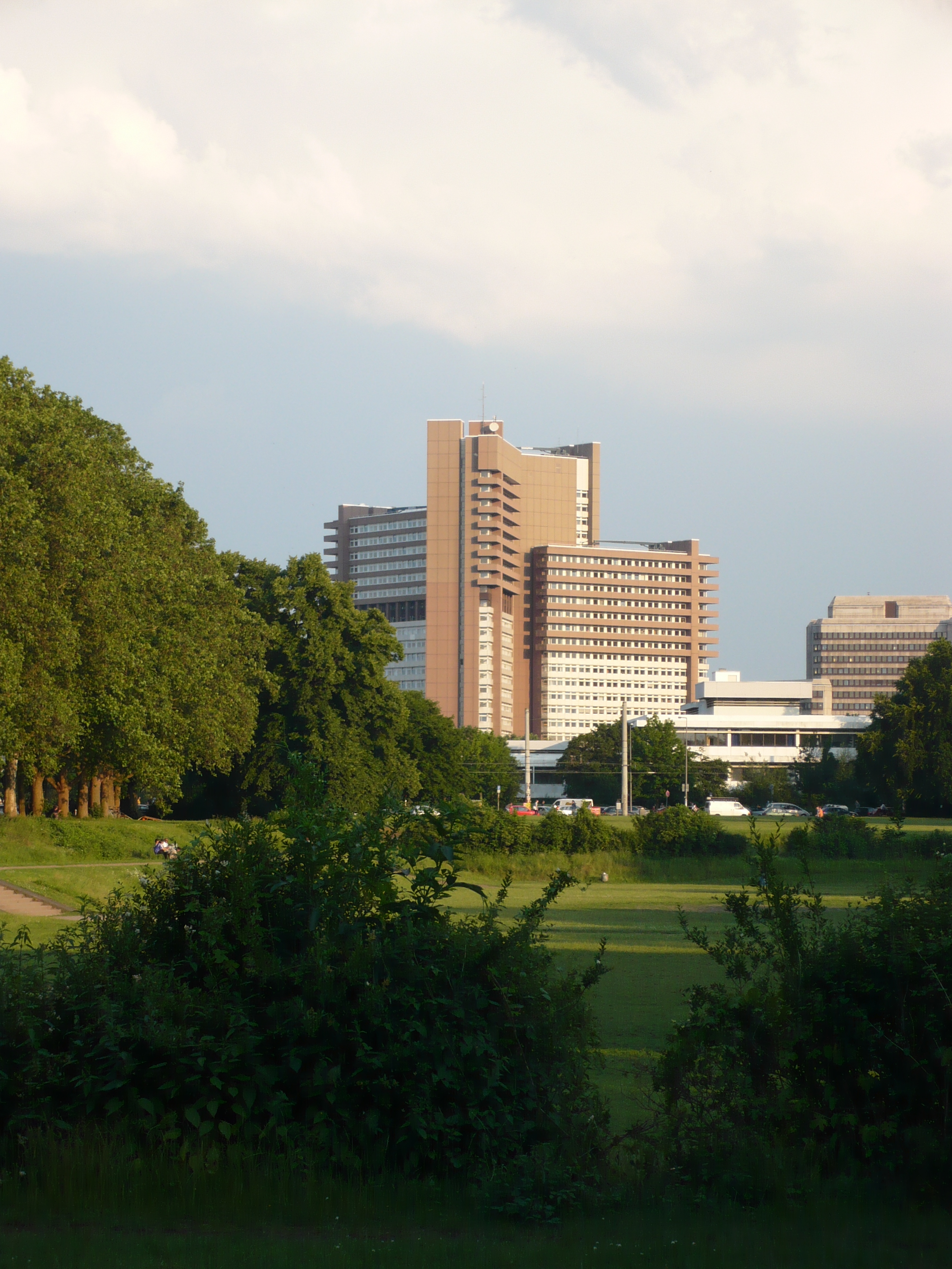 Gebäudes des Landgerichts und des Amtsgerichts Köln von Norden über die Uniwiese photographiert, Juni 2008